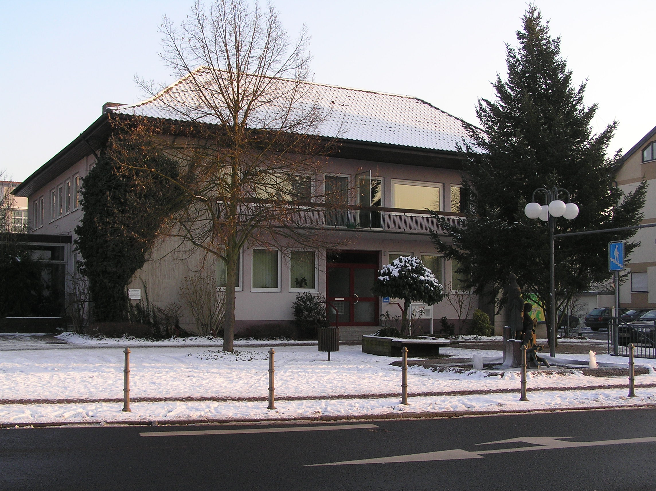 Das Elsenfelder Rathaus im Winter